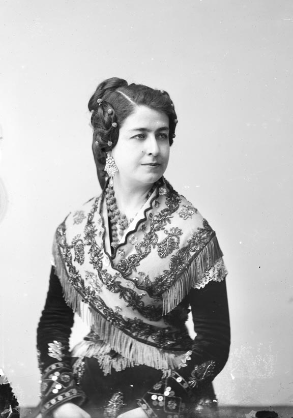 Retrat de bust de l'actriu María Tubau.